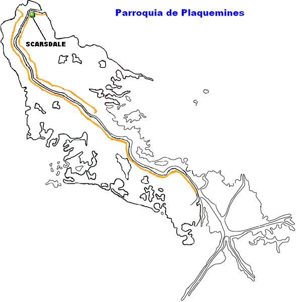 Scarsdale, Louisiana.